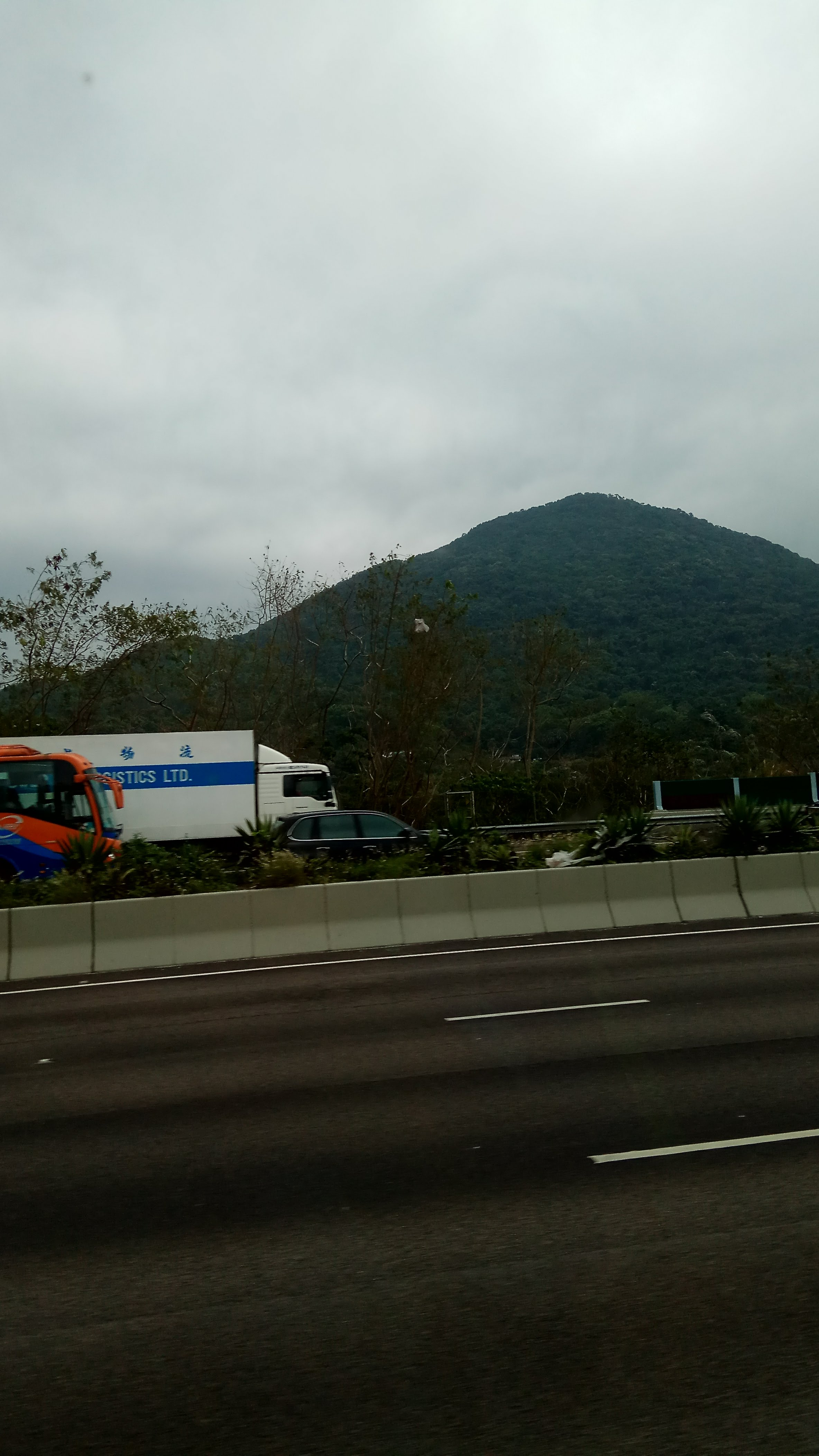 中文（香港）: 鹿山